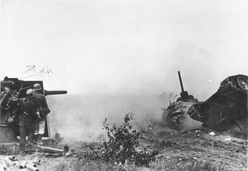 Schwere Flak im Kampf mit Sowjet-Panzern Von den Kämpfen unserer Truppen nördlich Orel. Schwere Flak kämpft feindliche Panzer im Direktbeschuß nieder. PK-Aufnahme: Kriegsberichter Lachmann 27.7.42